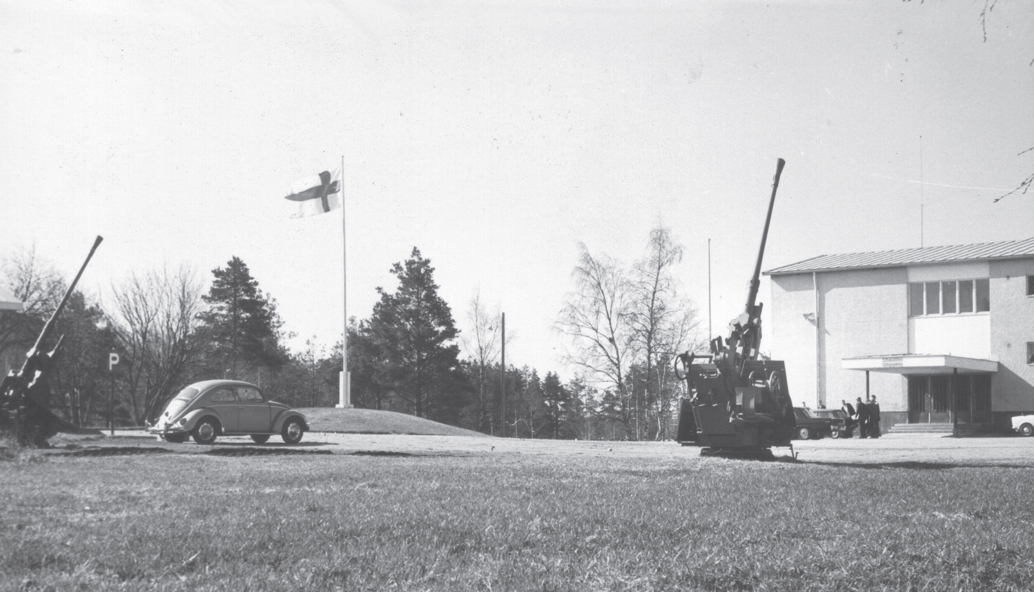 Kokkolan Pikiruukin perinnetykit.